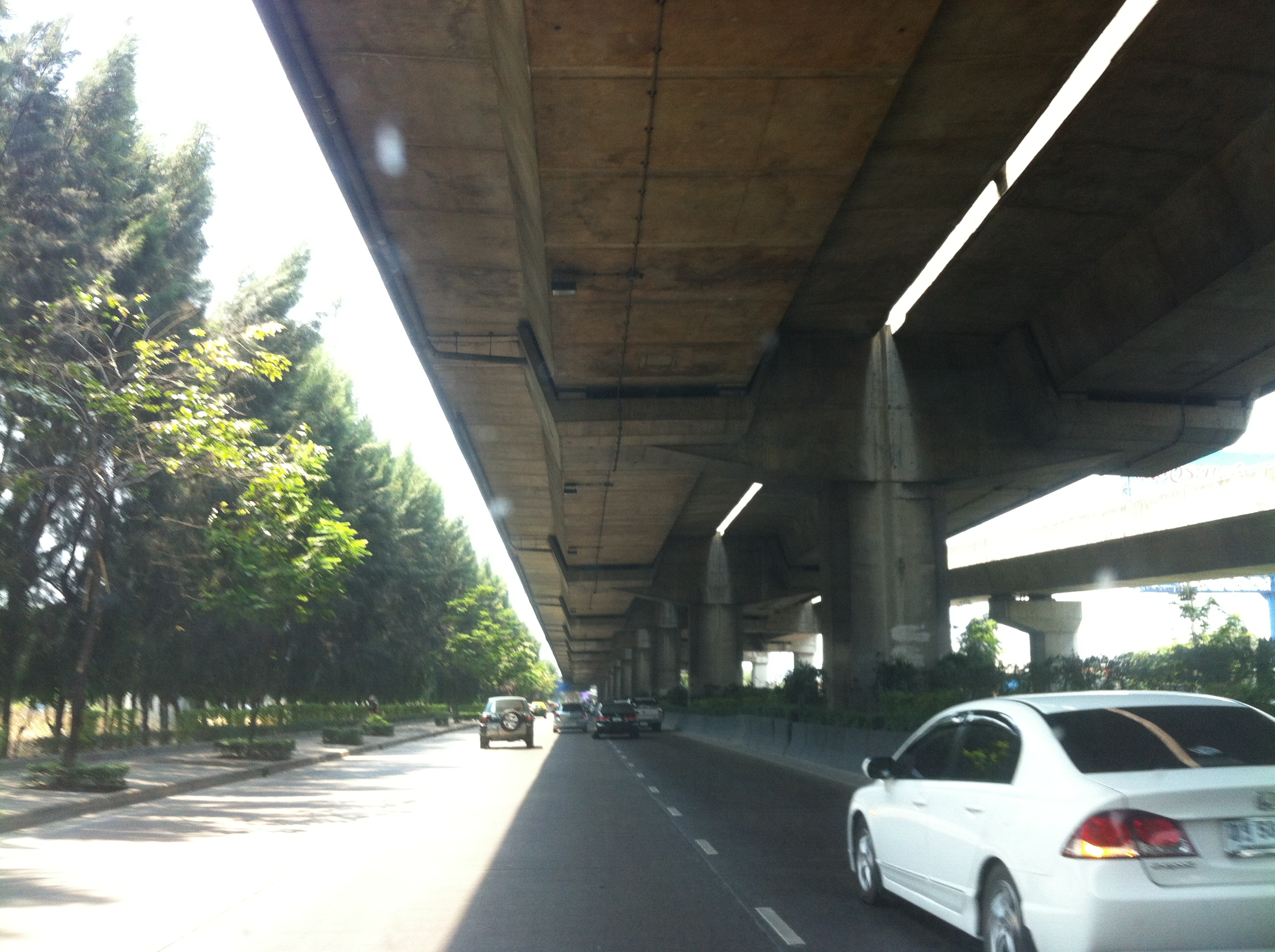 Suan Luang, Bangkok, Thailand